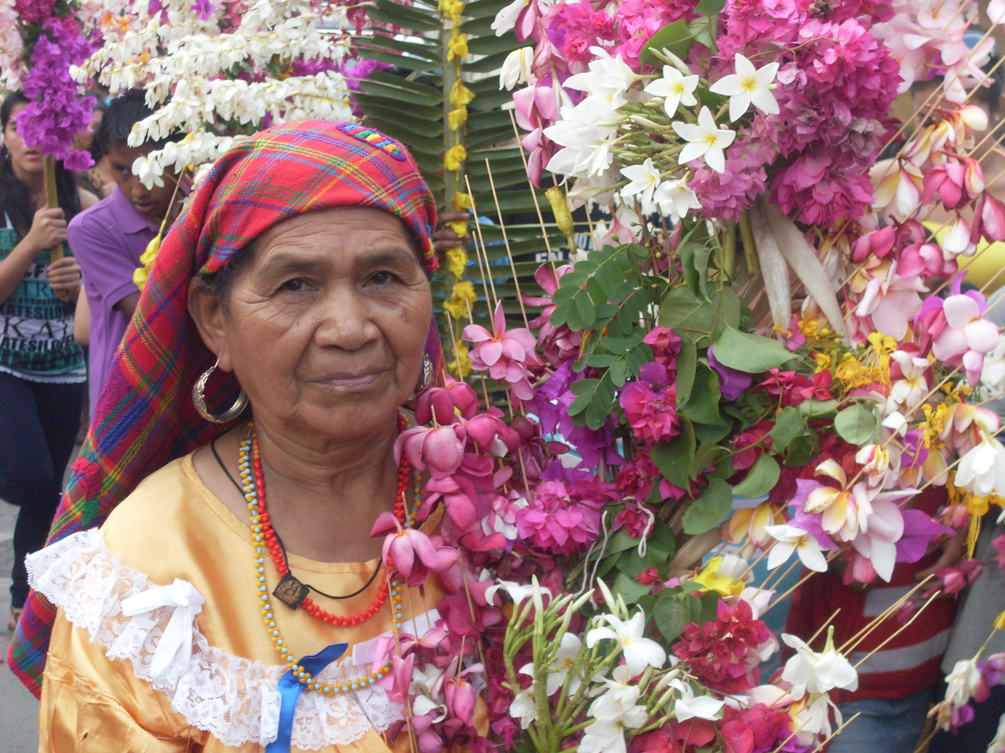 Salvadoreña en la Feria cultural de la flores y las palmas Unknown